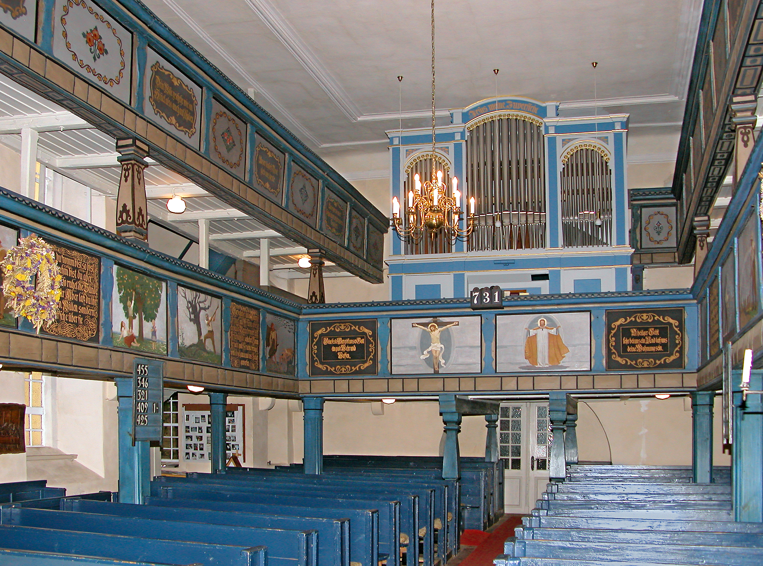 13.10.2006 01108 Dresden-Weixdorf, Lausaer Kirchgasse: Pastor-Roller-Kirche (GMP: 51.151448,13.807856) in Lausa: 1429 gingen die alte Holzkirche in Flammen auf. Danach ist vermutlich der Grundstein zu einer Steinkirche gelegt worden, die den Ursprung der heutigen Kirche bildet. 1811-1815 wirkte hier der durch seine Volksverbundenheit bekannte Pastor Roller. 1855 erfolgte der Einbau der Orgel von der Fa. Jahn in Dresden, die nach Blitzschlag 1905 von der Fa. Jehmlich aus Dresden erneuert wurde. 1912 erfuhr die Kirche ihre jetzige ultramarinfarbige Ausmalung. Die Bilder an den Emporen malte der Lausaer Maler Hermann. 1986-1989 Generalreparatur der Kirche. [DSCN12019.TIF]20061013025DR.JPG(c)Blobelt